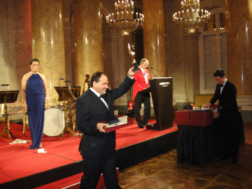 Награда за најусшена компанија и менаџер од Европската Бизнис Асамблеа, Виена, Австрија, 2012